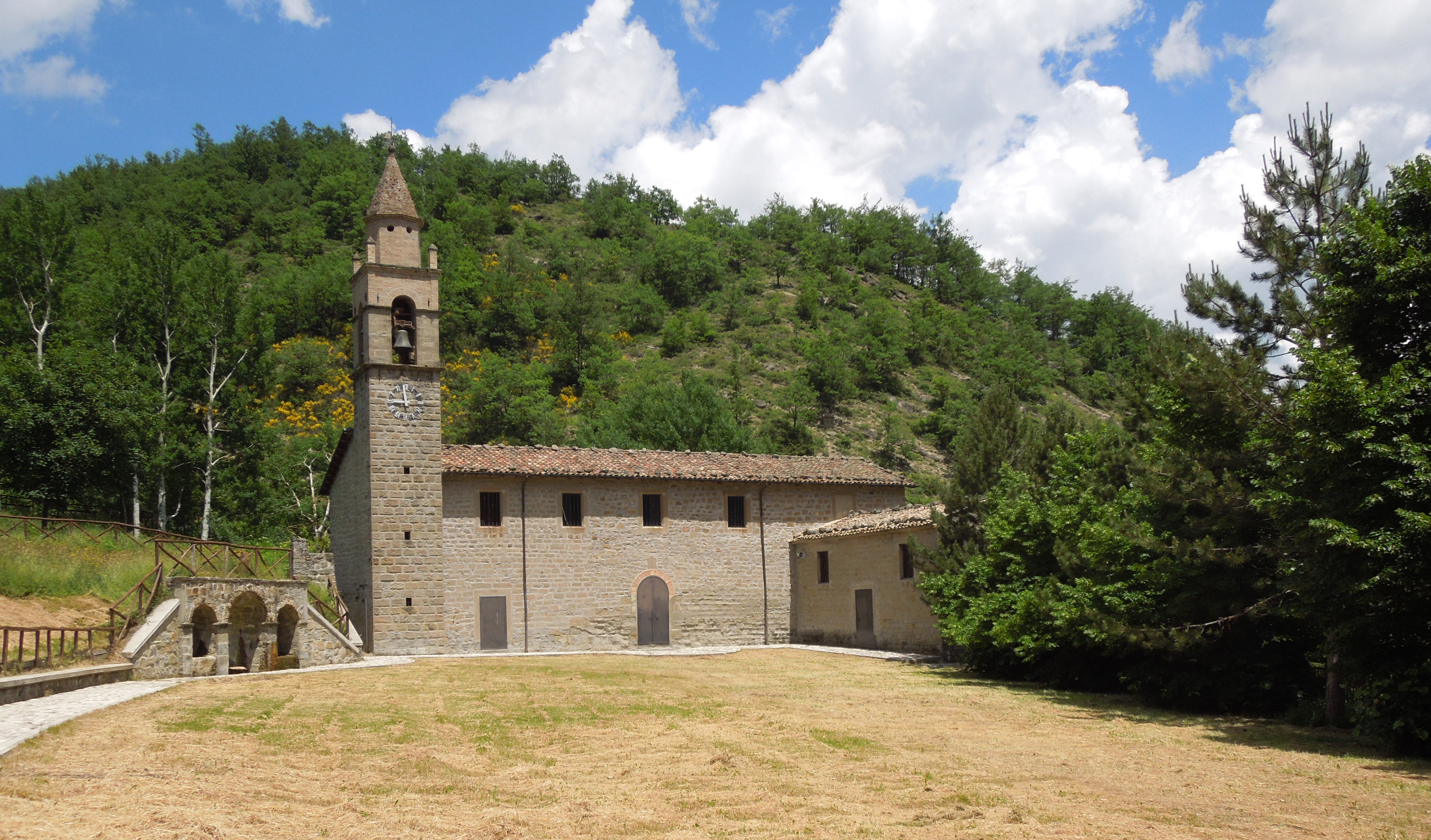 Chiesa di Santa Maria Assunta del paese di Padula, frazione del comune di Cortino in provincia di Teramo.